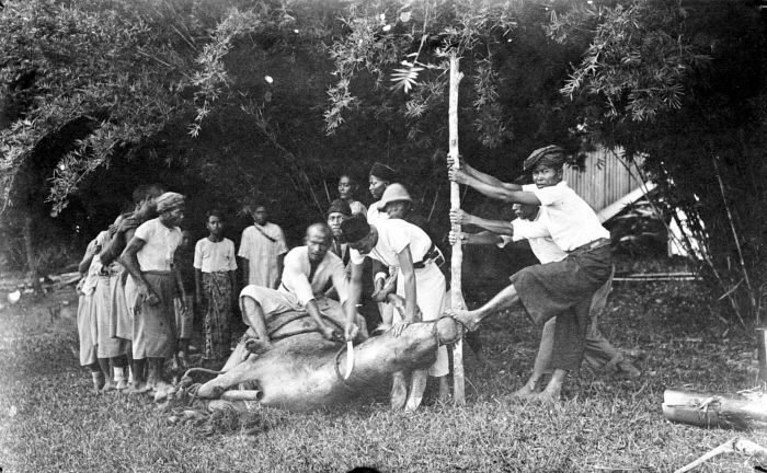 Repronegatief. Ritueel slachten van een karbouw te Asahen, Oost-Sumatra.